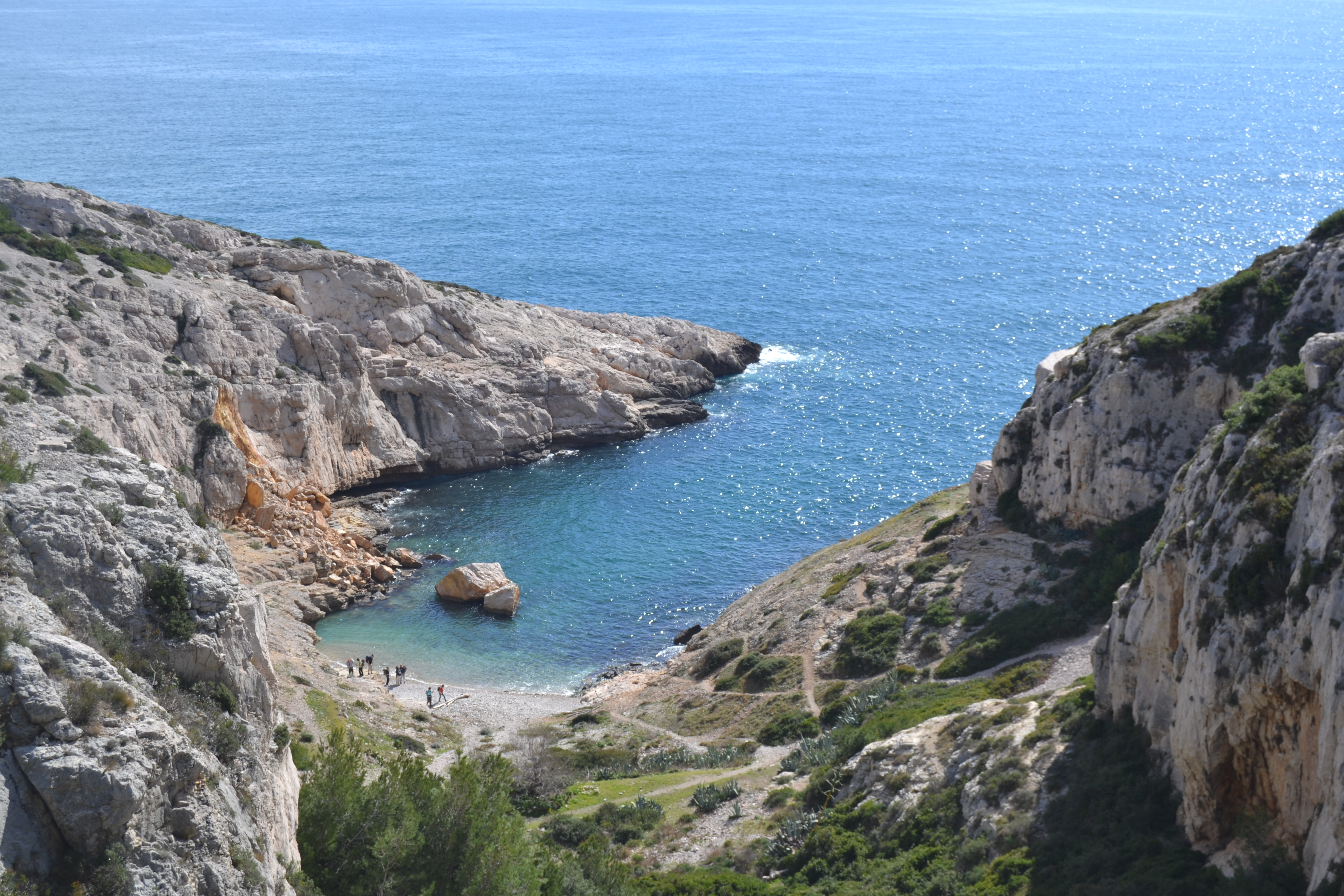 Calanca de Podestat en 2013.